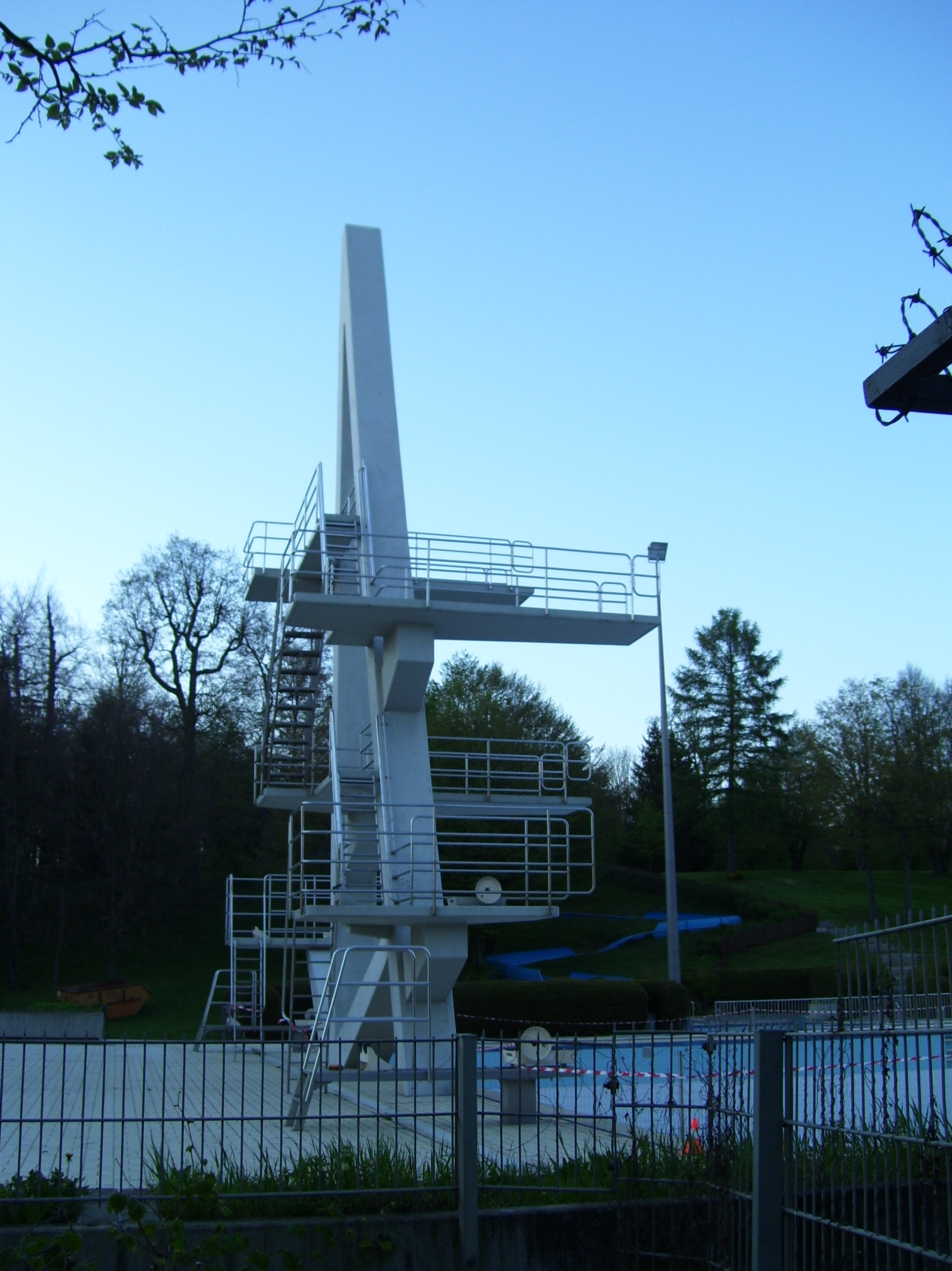 Sprungturm des Badezentrums Sindelfingen